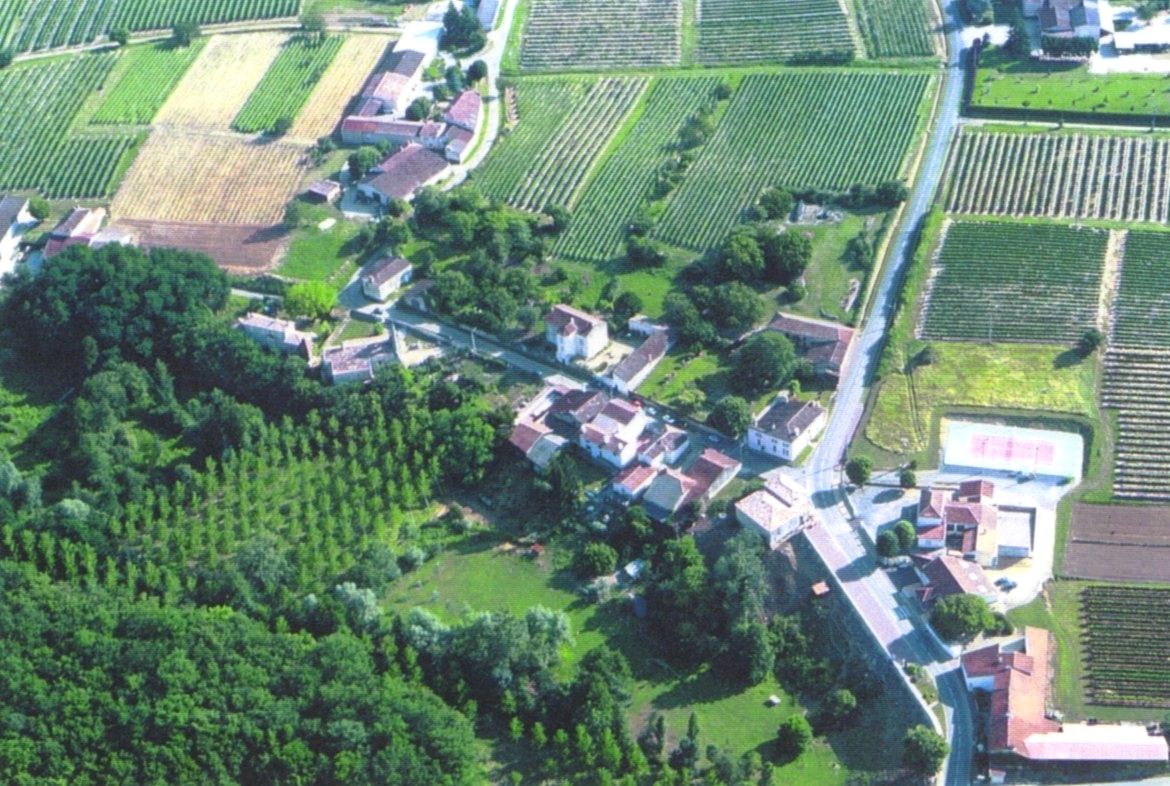 Vue Aerienne d'Escoussans